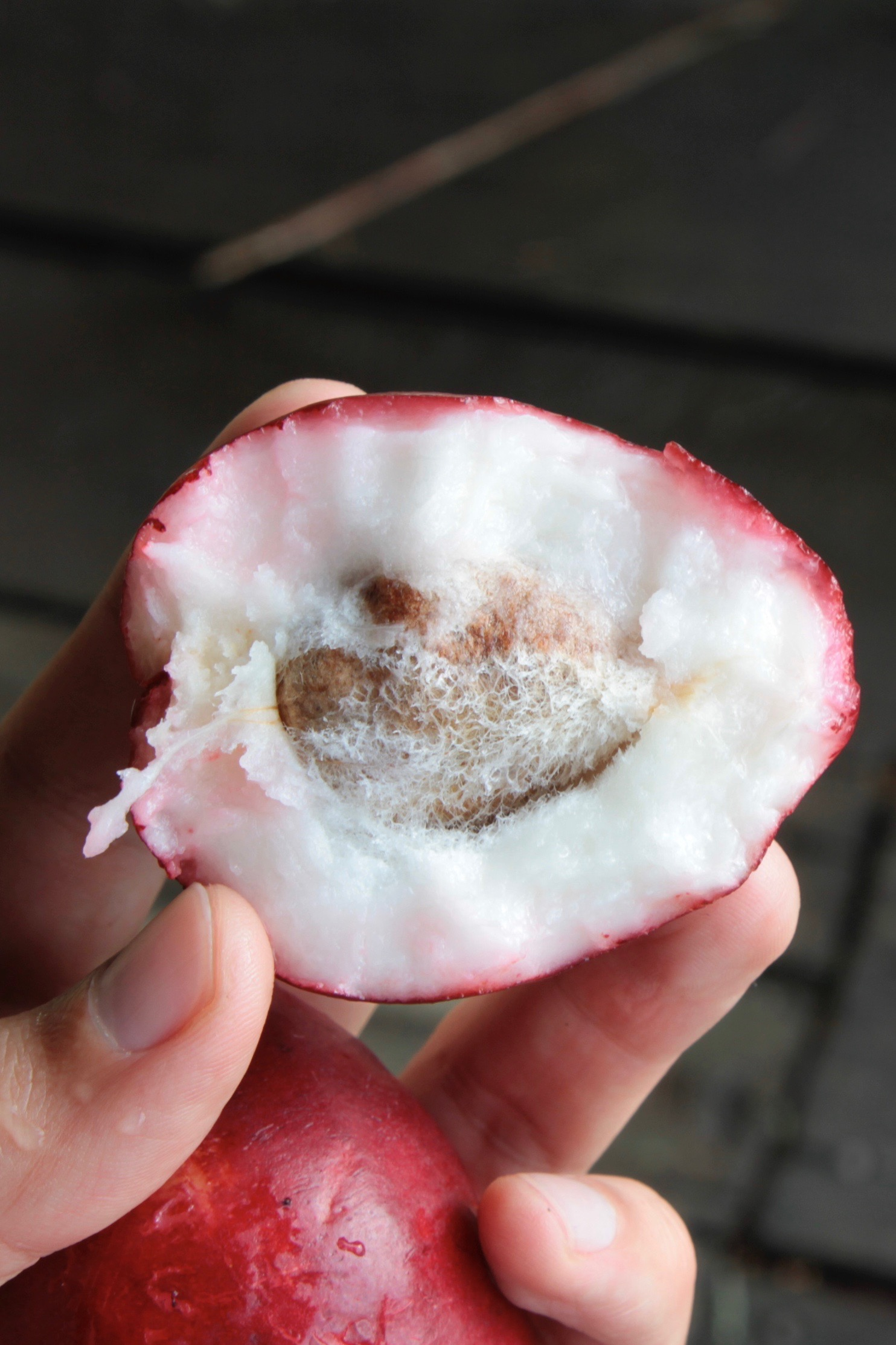 Venezuela, Caura Lodge